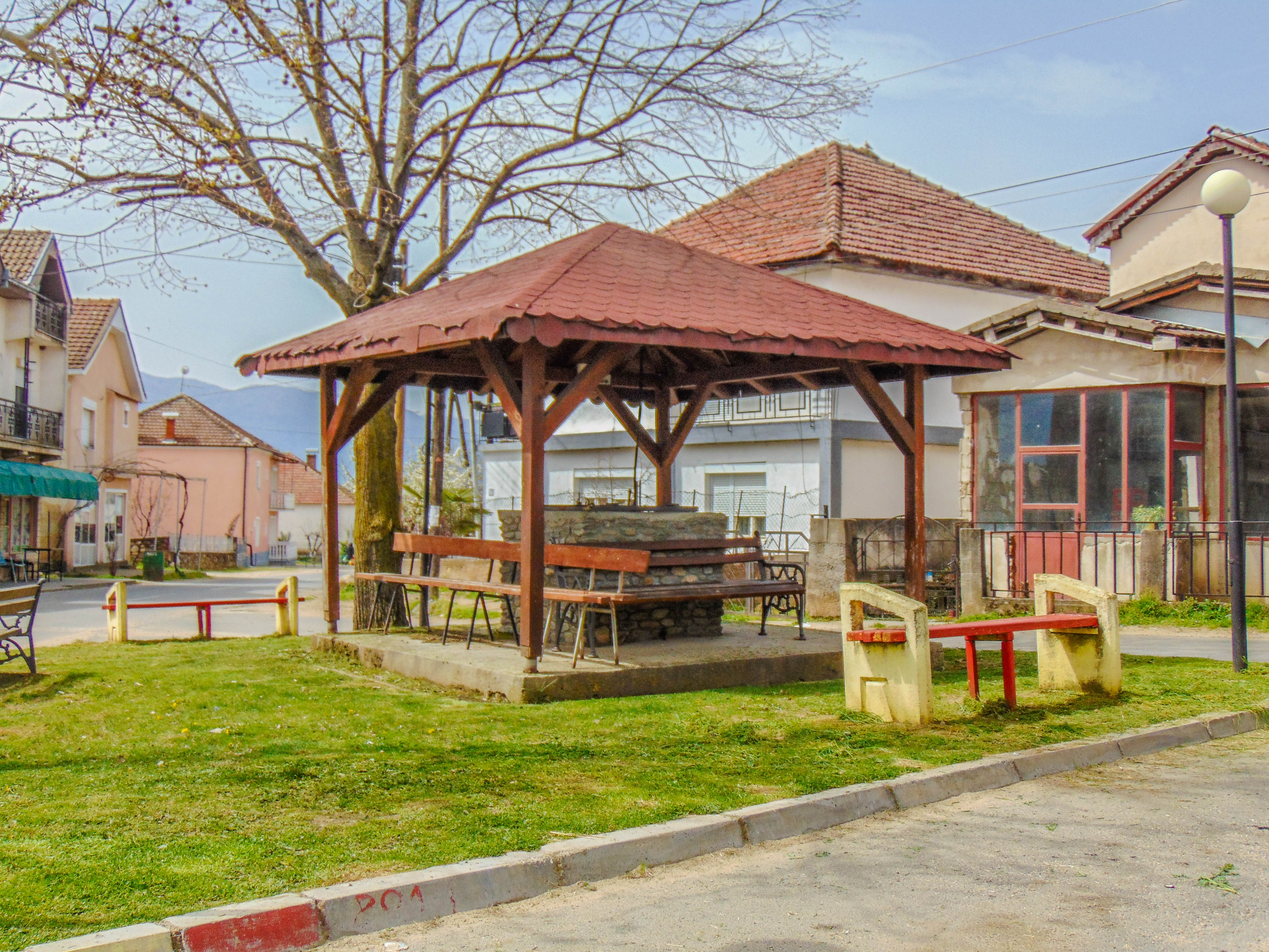 Бунар во Ново Село